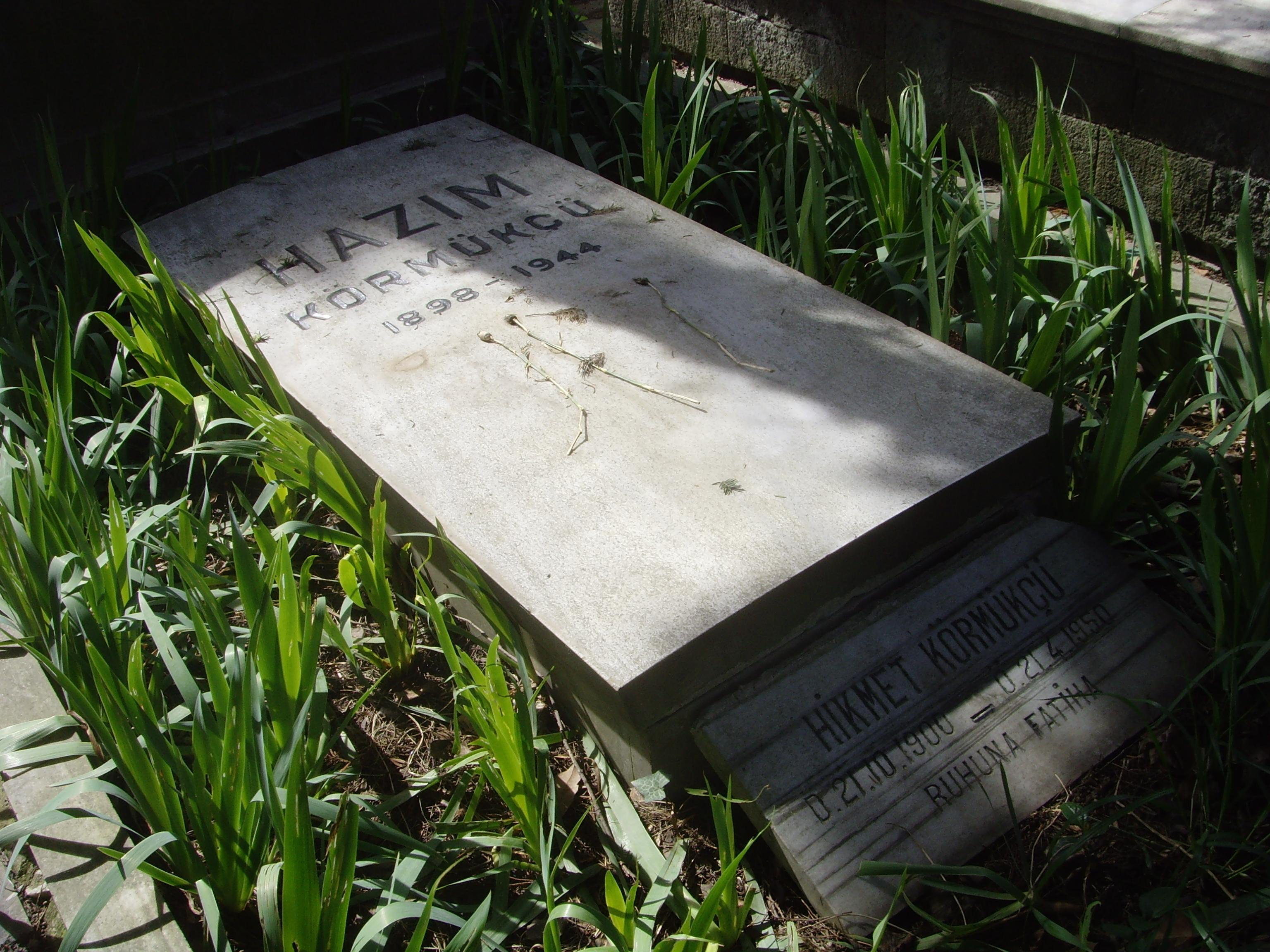 Hazım Körmükçü (dede)'nün Zincirlikuyu Mezarlığı'ndaki mezarı